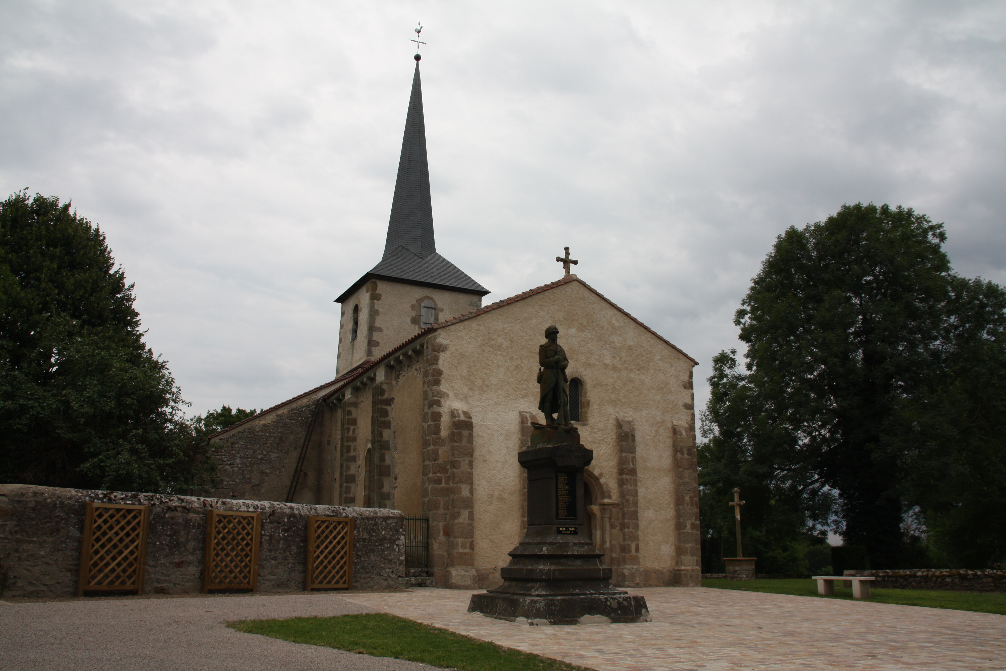 Église de Saint-Marcel-en-Murat, France